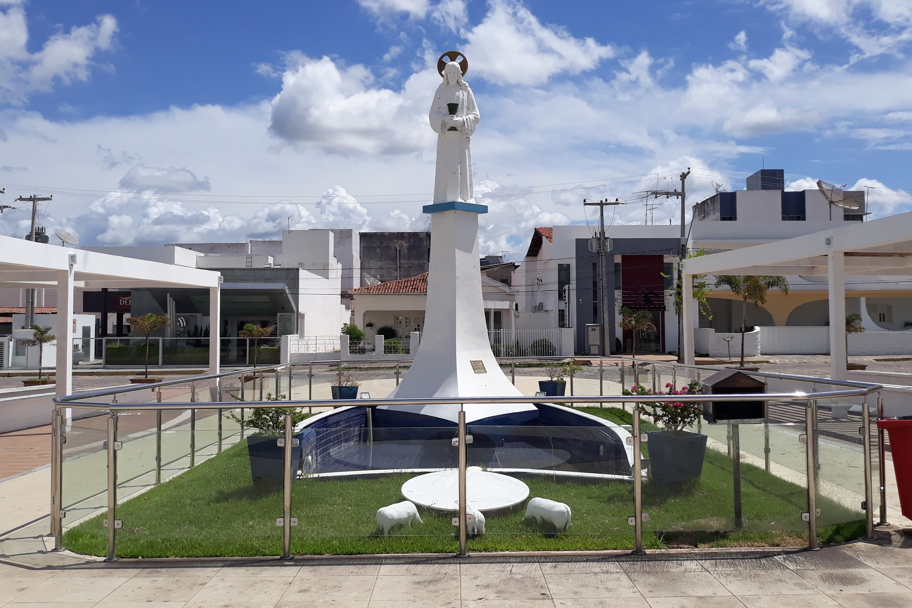 Estátua do Milagre Eucarístico na Praça do Milagre em Sousa, Paraíba (Brasil)